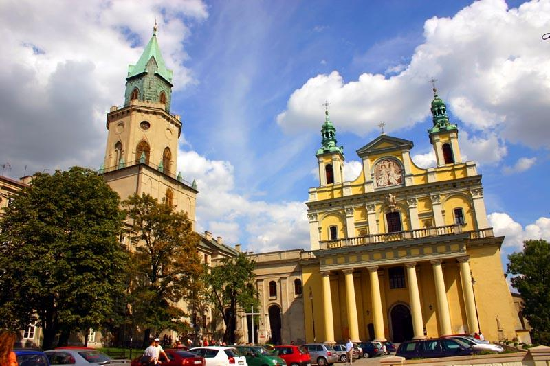 Lublin, Wieża Trynitarska i Archikatedra od strony Placu Katedralnego